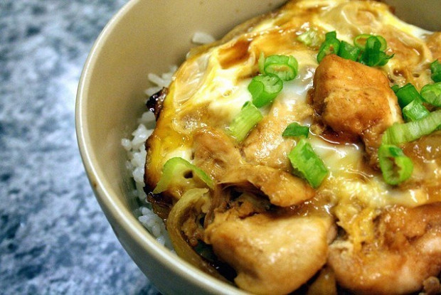 Приготовленное блюдо Оякодон.